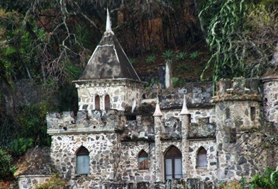 Construcción medieval en la ribera norte del Lago de Amatitlán